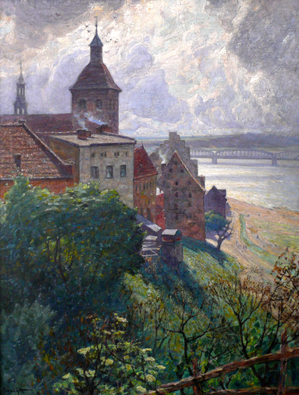 Blick über den Schlossberg auf Graudenz, geschaffen von Oswald Gette, Öl auf Leinwand, 1909